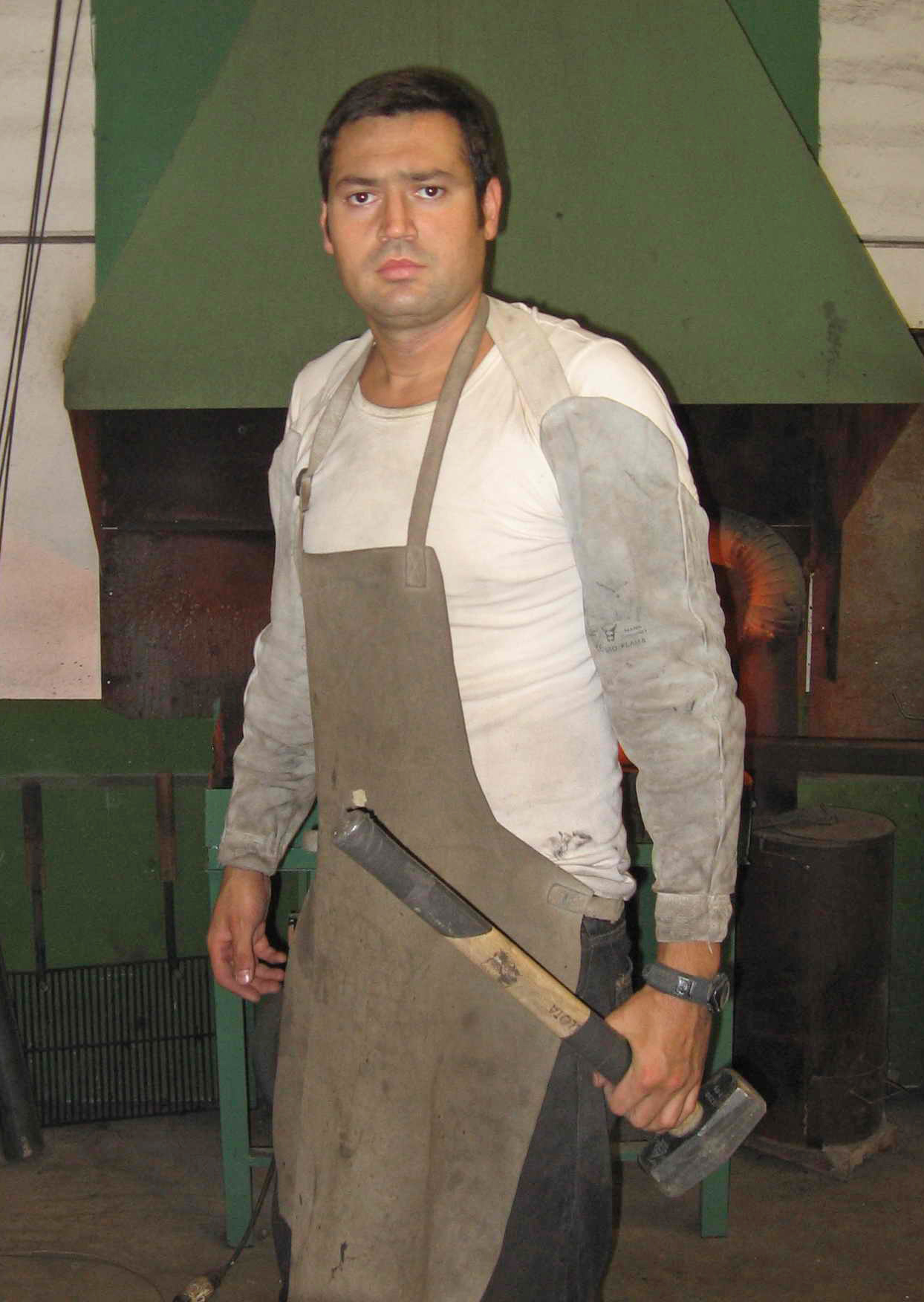 Taller